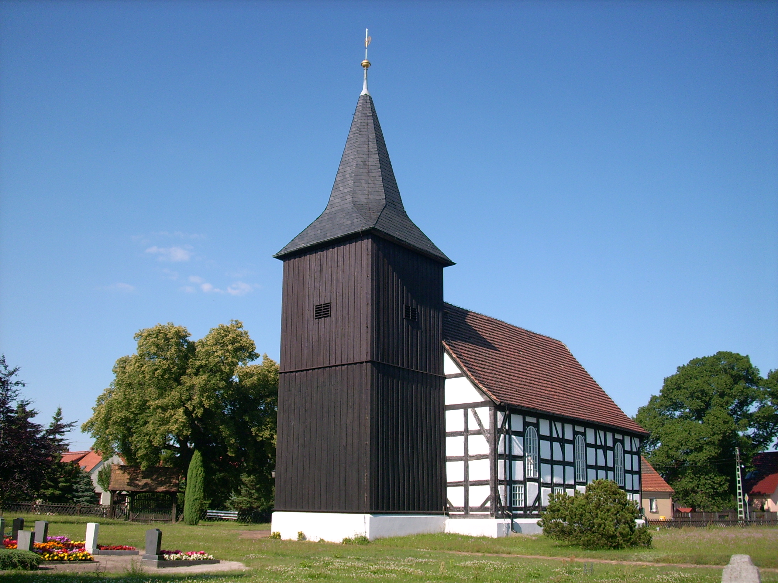 Kirche in Bluno, Elsterheide Hornjoserbsce: Blunjanska cyrkej